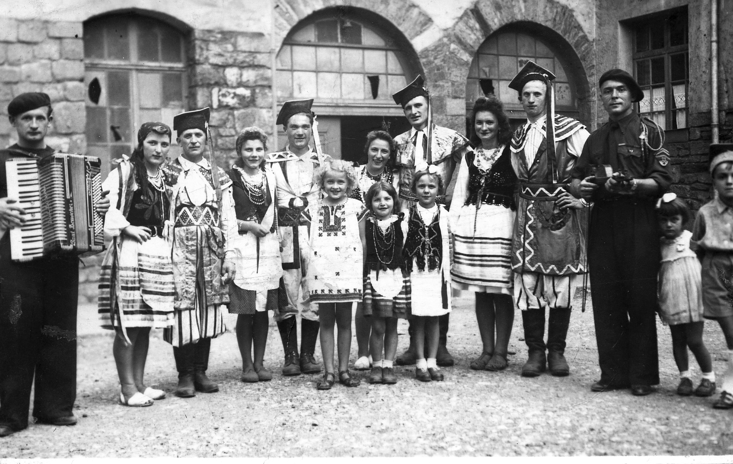 population polonaise d'Ugitech en 1945